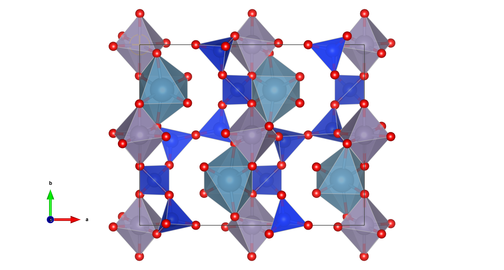 Kristallstuktur von Stokesit als "Polyeder-Modell". Erstellt mithilfe des freien Strukturprogramms VESTA und den CIF-Daten von Atso Vorma Farblegende: Silicium-Tetraeder: dunkelblau; Zinn-Oktaeder: lila; Calcium-Polyeder: grünblau; Sauerstoff: rot.